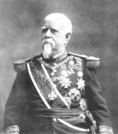 Fotografía del general español Marcelo Azcárraga publicada con motivo de su fallecimiento